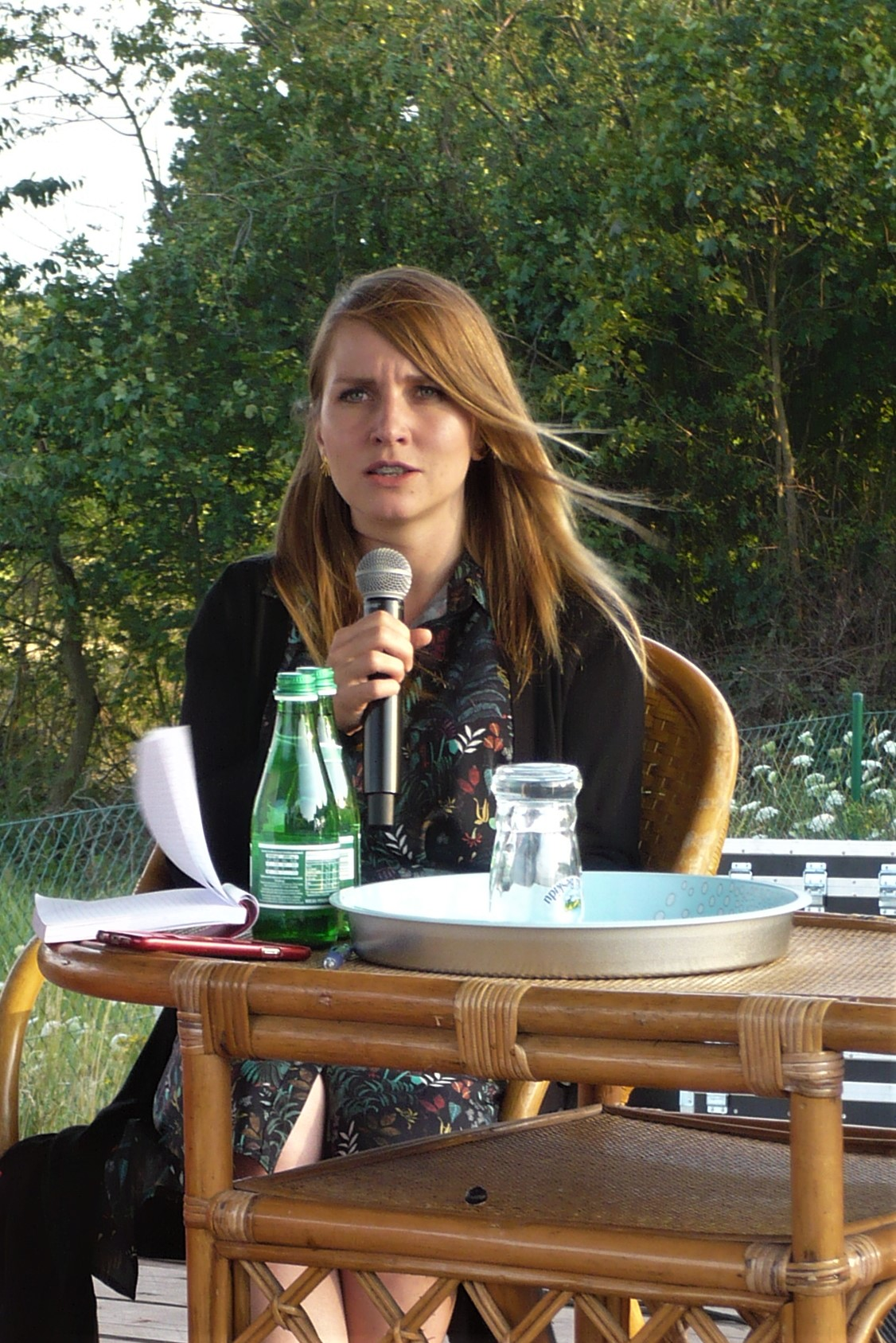 Dorota Masłowska, Festiwal Góry Literatury, 2018